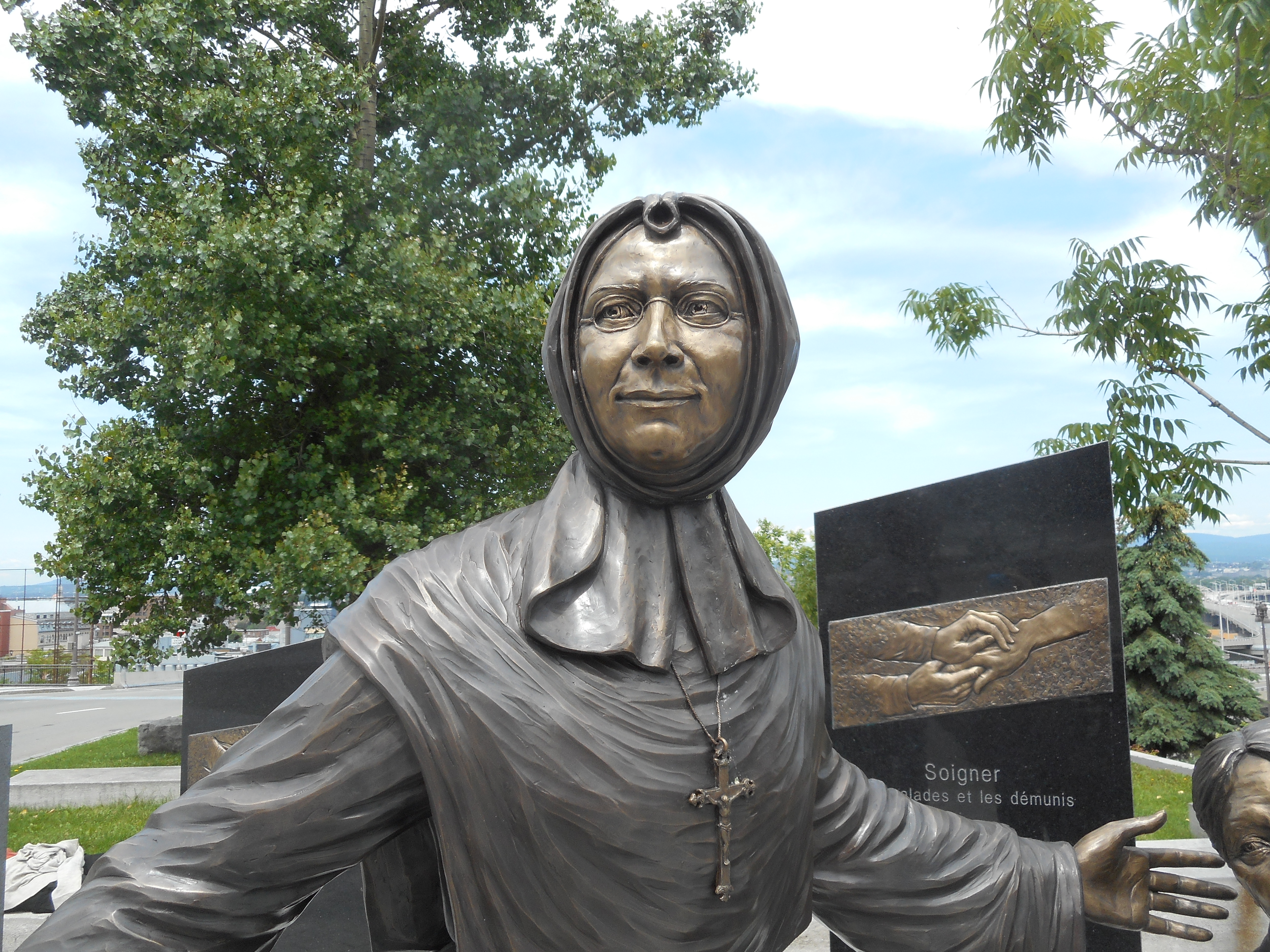 Hommage aux Soeurs de la Charité de Québec est une sculpture de bronze et de granit réalisée par Jules Lasalle en 2015. Elle représente mère Mallet auprès d'orphelins et d'une dame âgée. Elle est située entre les deux voies de l'avenue Honoré-Mercier à l'intersection de la rue des Soeurs-de-la-Charité.